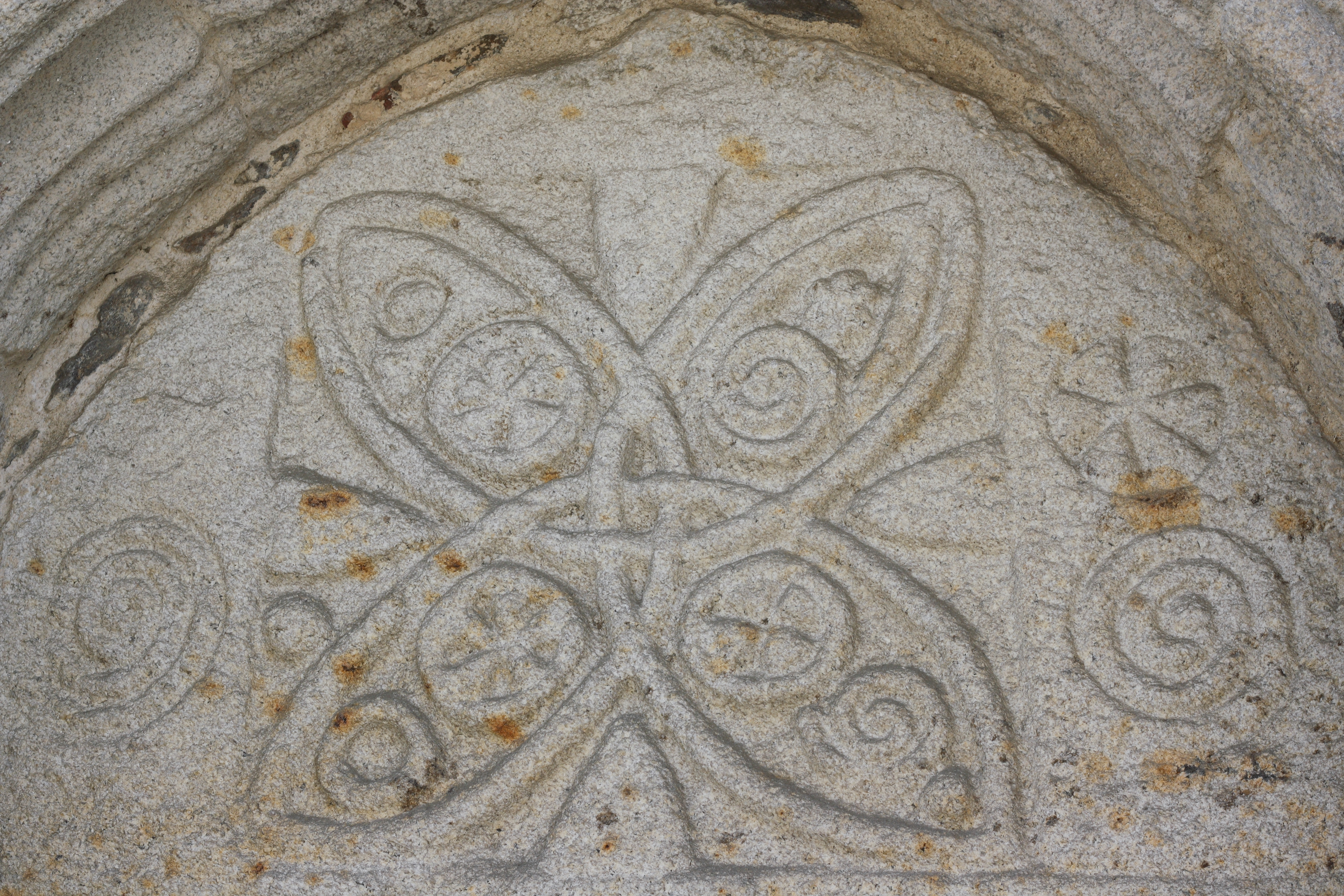 Katholische Kirche Santiago in Bembrive (Vigo) in der spanischen Provinz Pontevedra (Galicien), Tympanon des Nordportals, Relief mit Vierpass und geometrischen Motiven